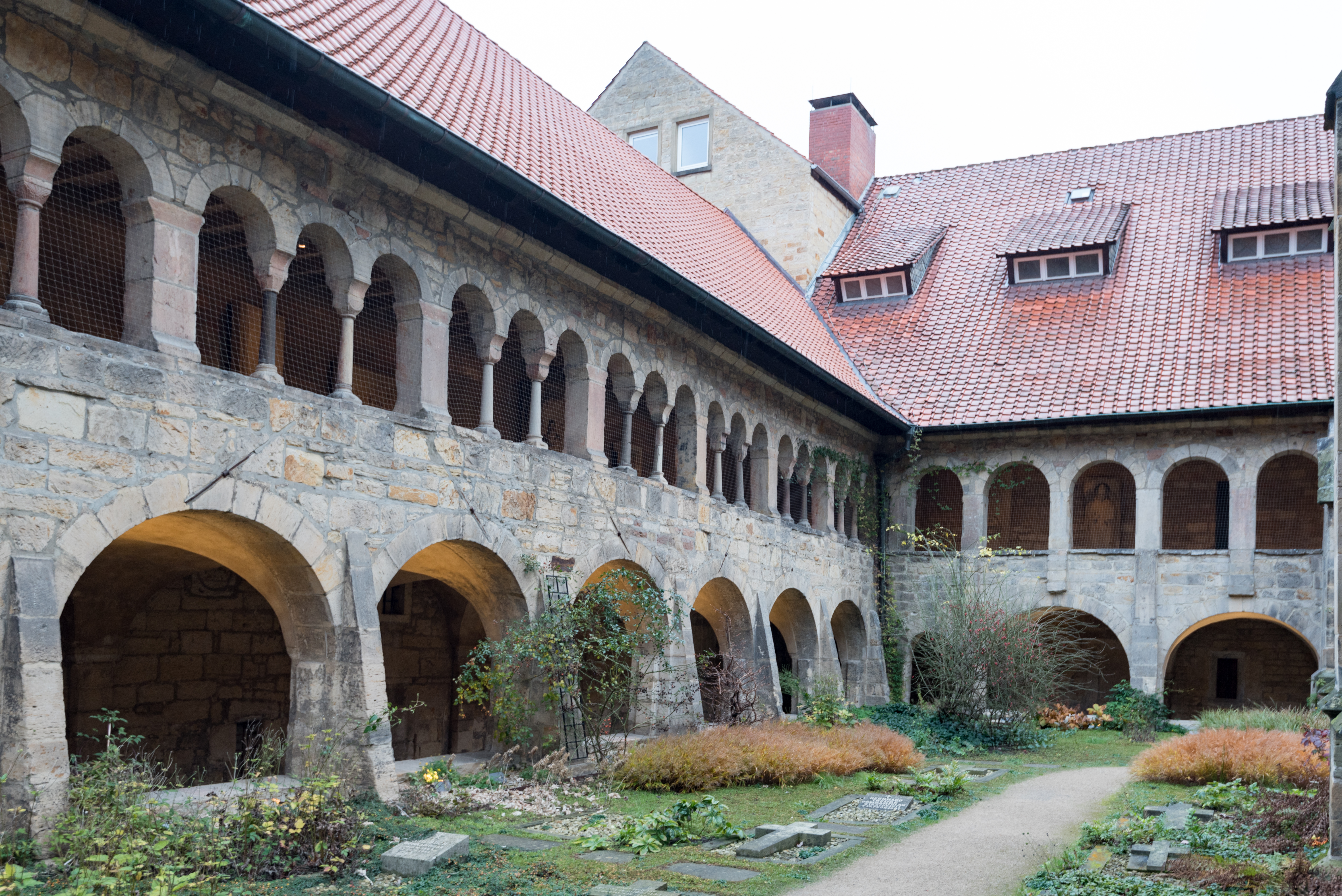 Hildesheim, Domhof, Dom, Kreuzgang